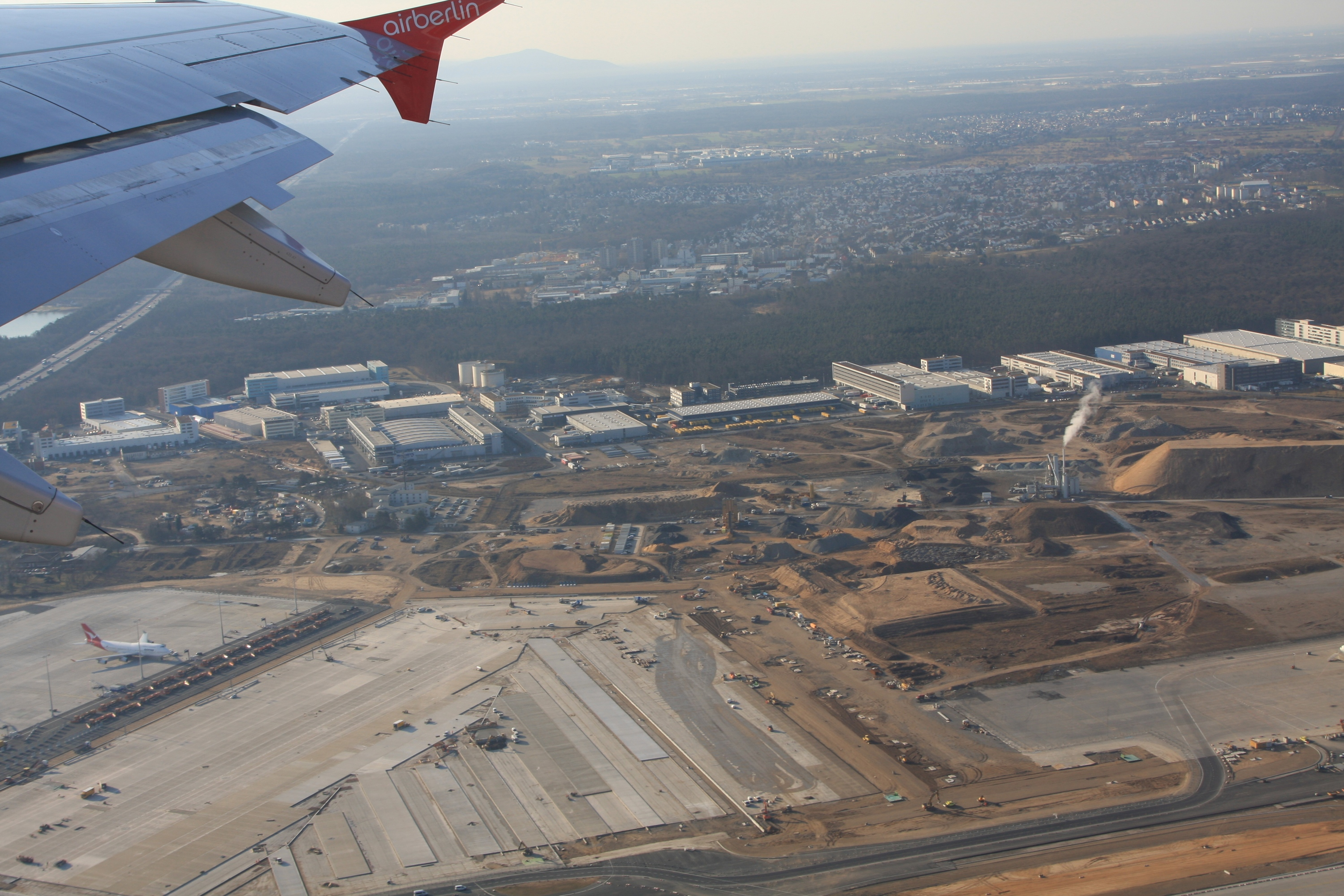 Der Aushub des Geländes (ehemalige Air Force Base) zwecks Ausbau des Flughafens Frankfurt am Main (Terminal 3)